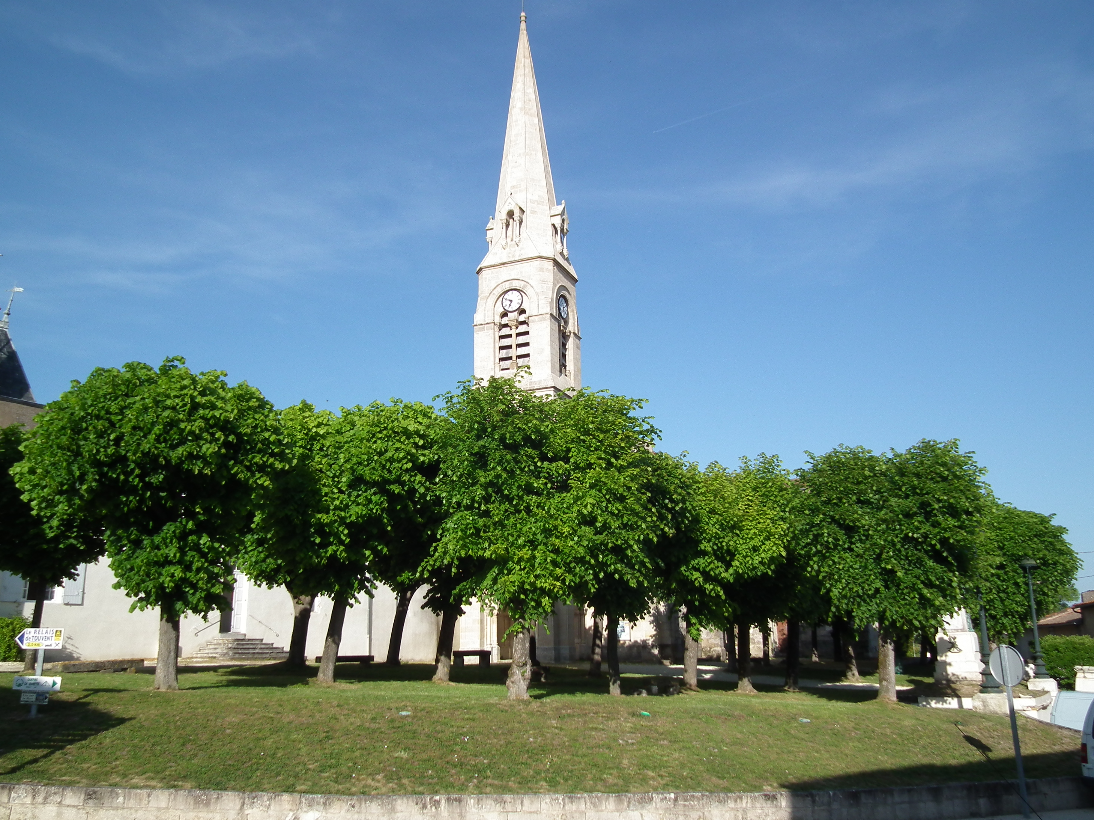 L'église Saint-Etienne de Mortagne-sur-Gironde